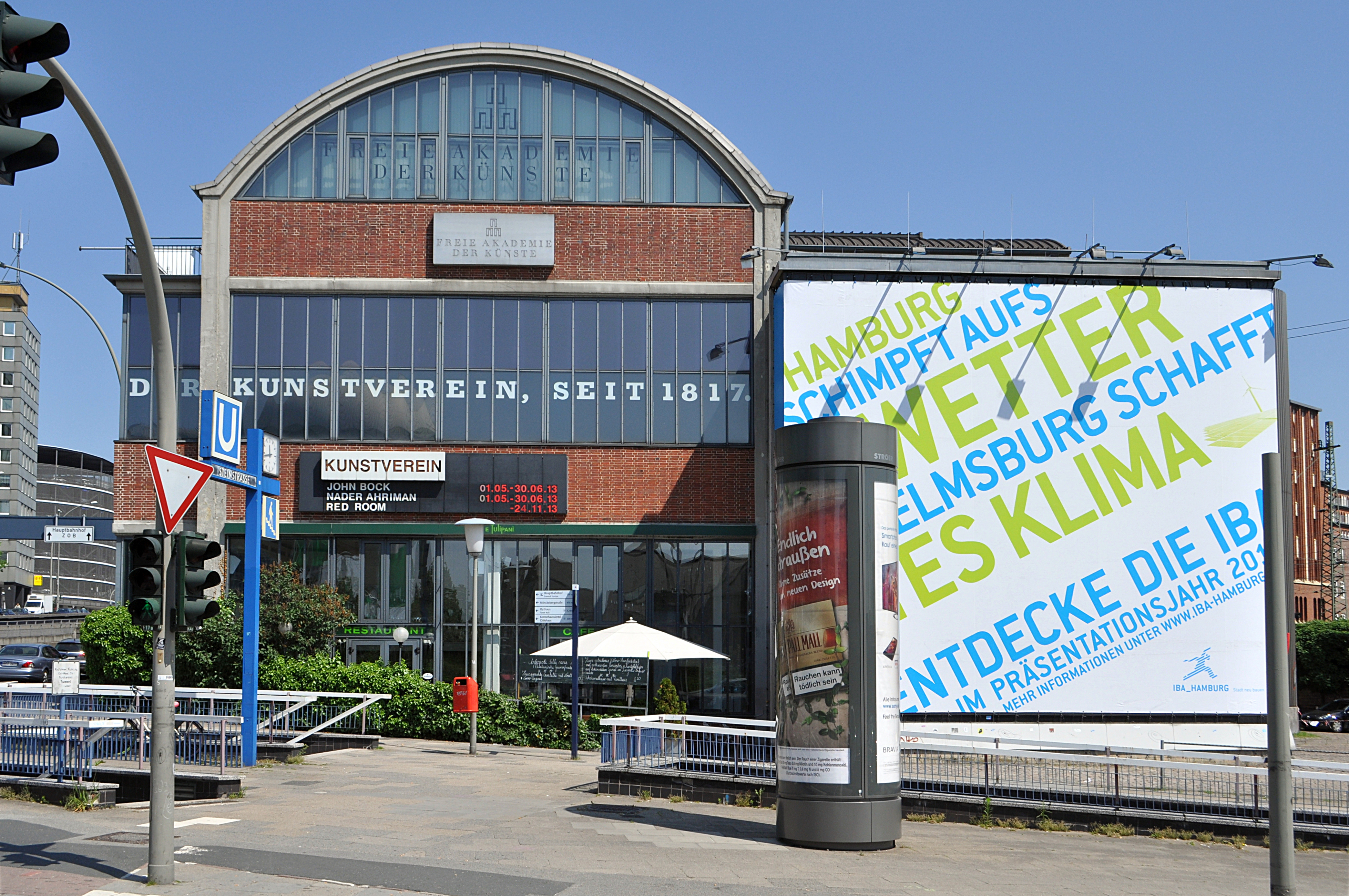 Kunstverein in der ehemaligen Blumenmarkthalle in Hamburg-Hammerbrook. This is a photograph of an architectural monument.